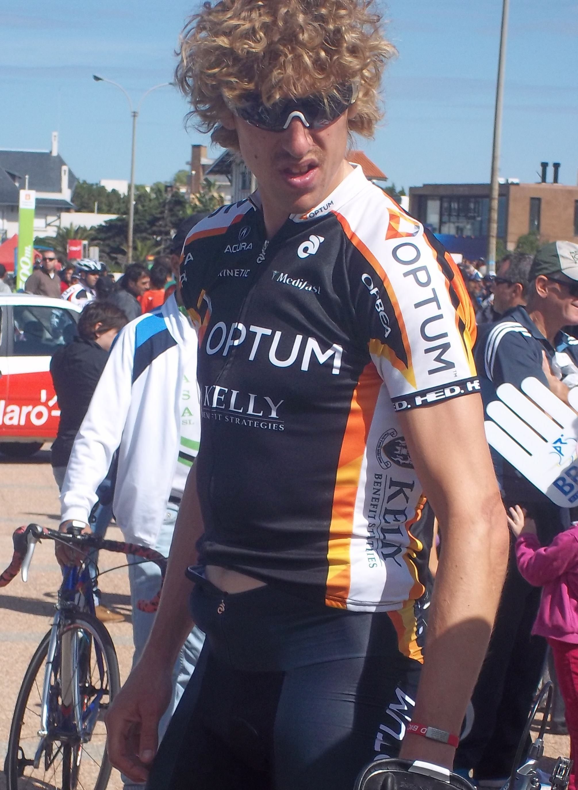 Tom Zirbel, en la Vuelta Ciclista del Uruguay 2012